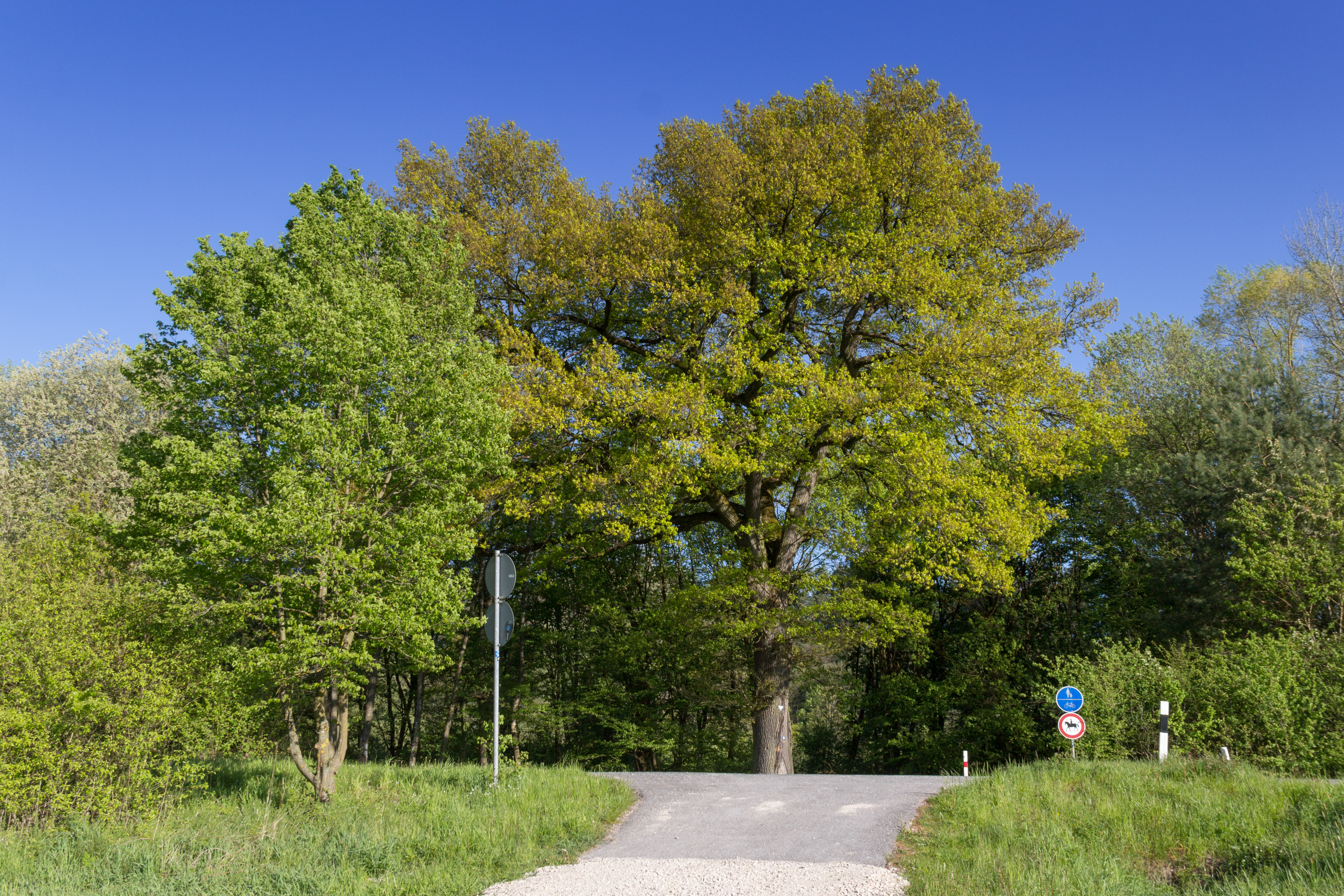 Eiche, Naturdenkmal (ND-04759), Schwarzenbruck